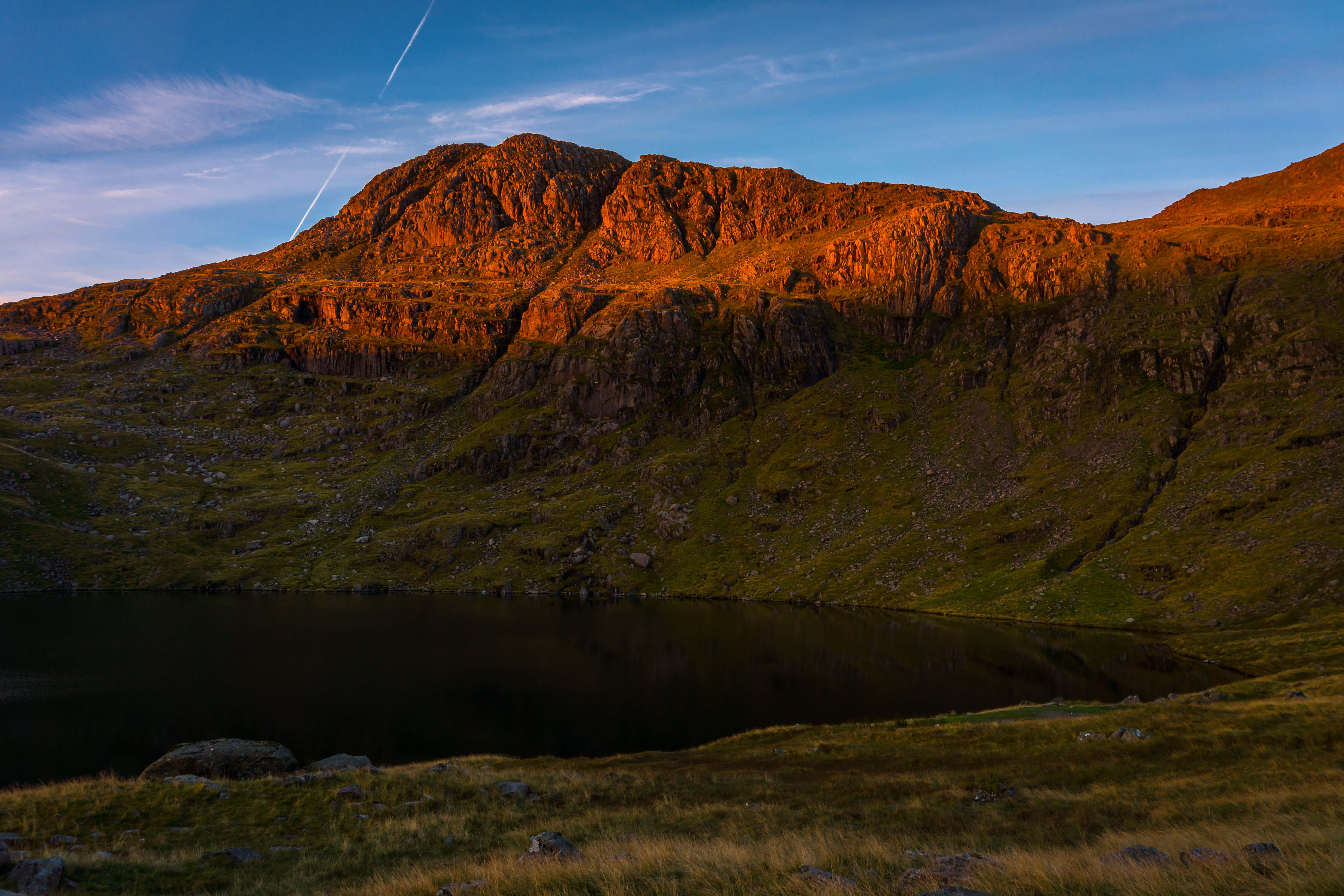 Esk Pike in Sunrise